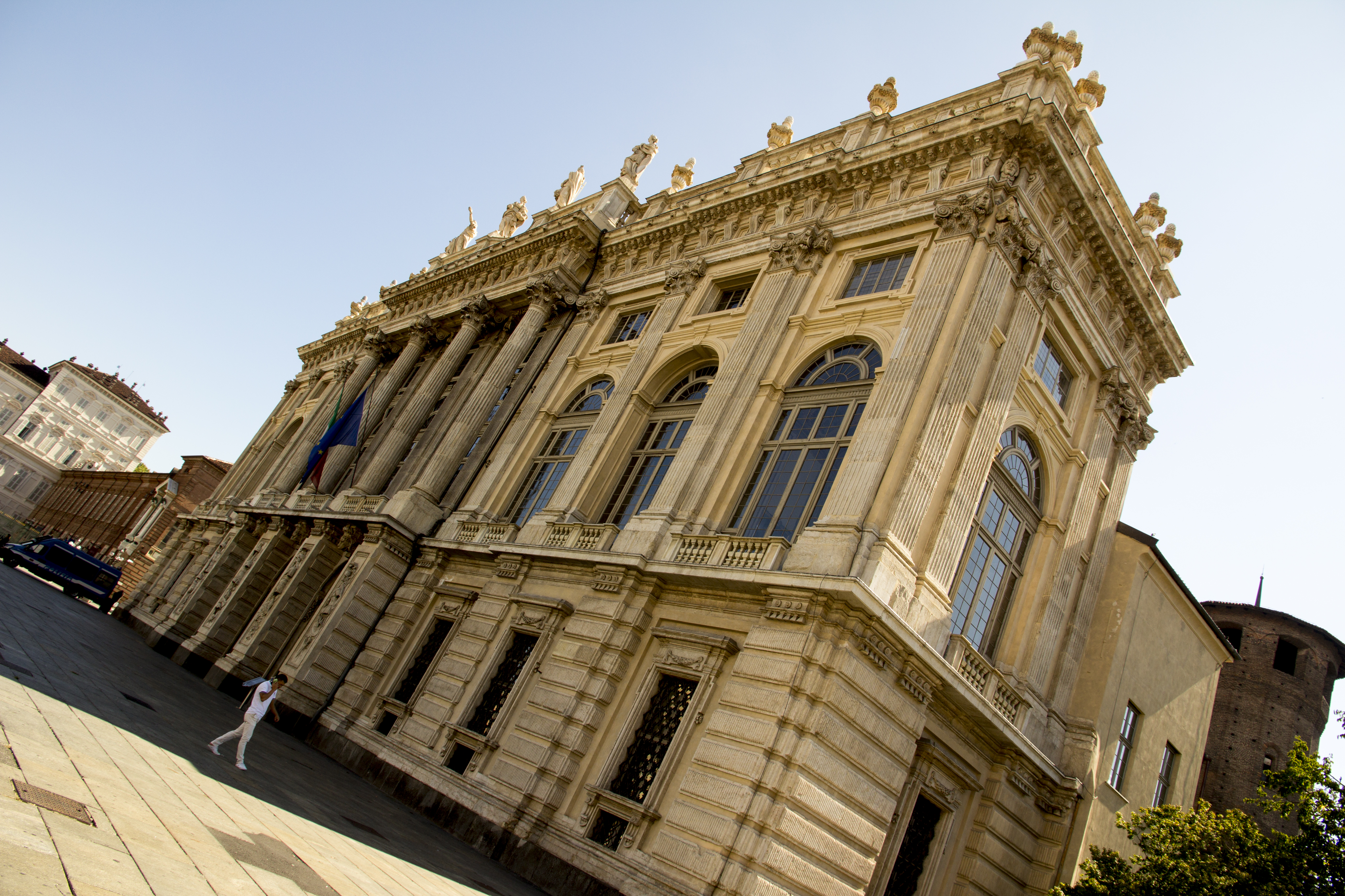 Palazzo Madama This is a photo of a monument which is part of cultural heritage of Italy.